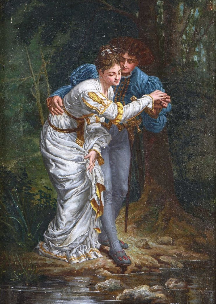 Le passage du gué